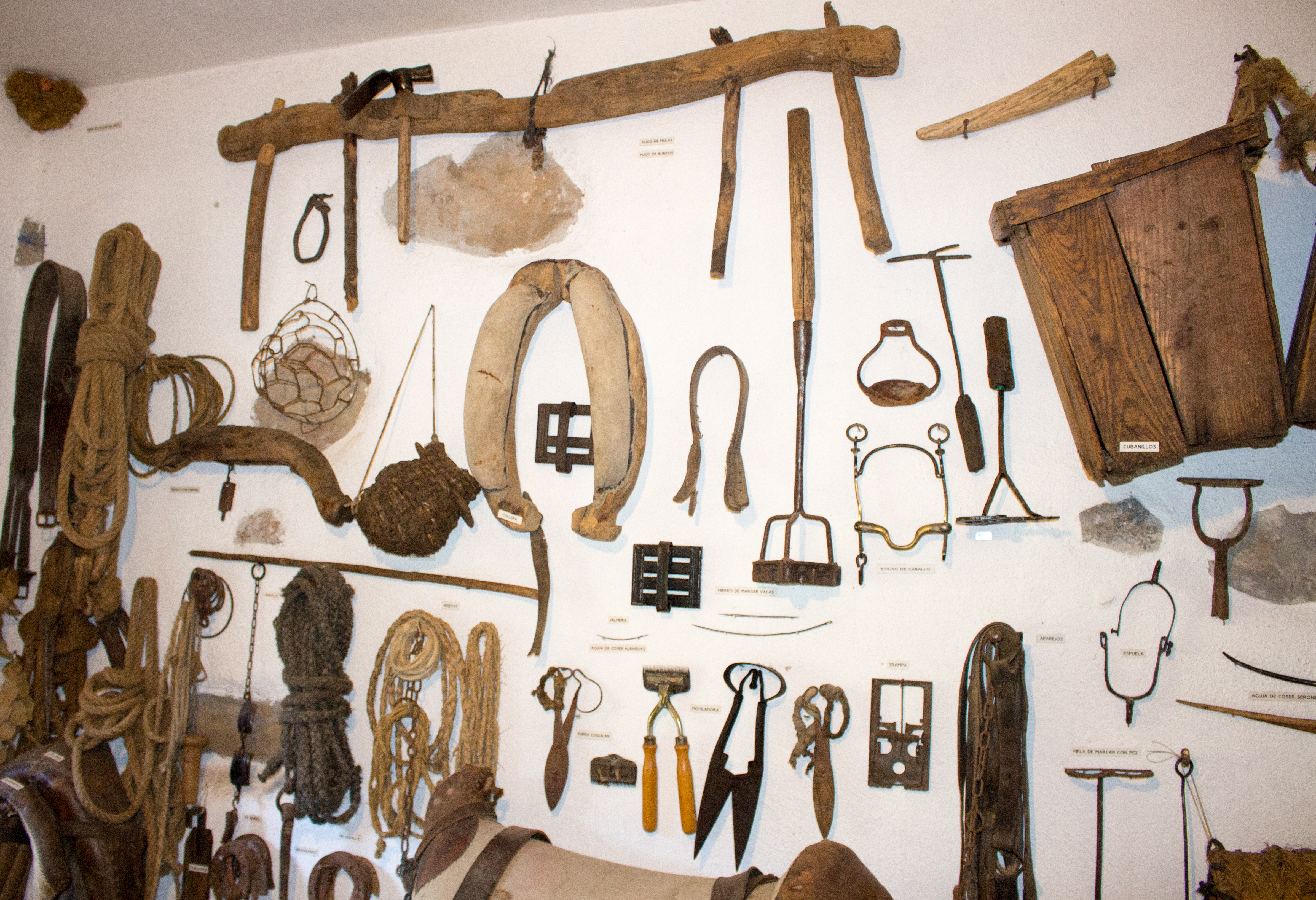 Aparejos, correajes y otros utensilios relacionados con los animales de carga